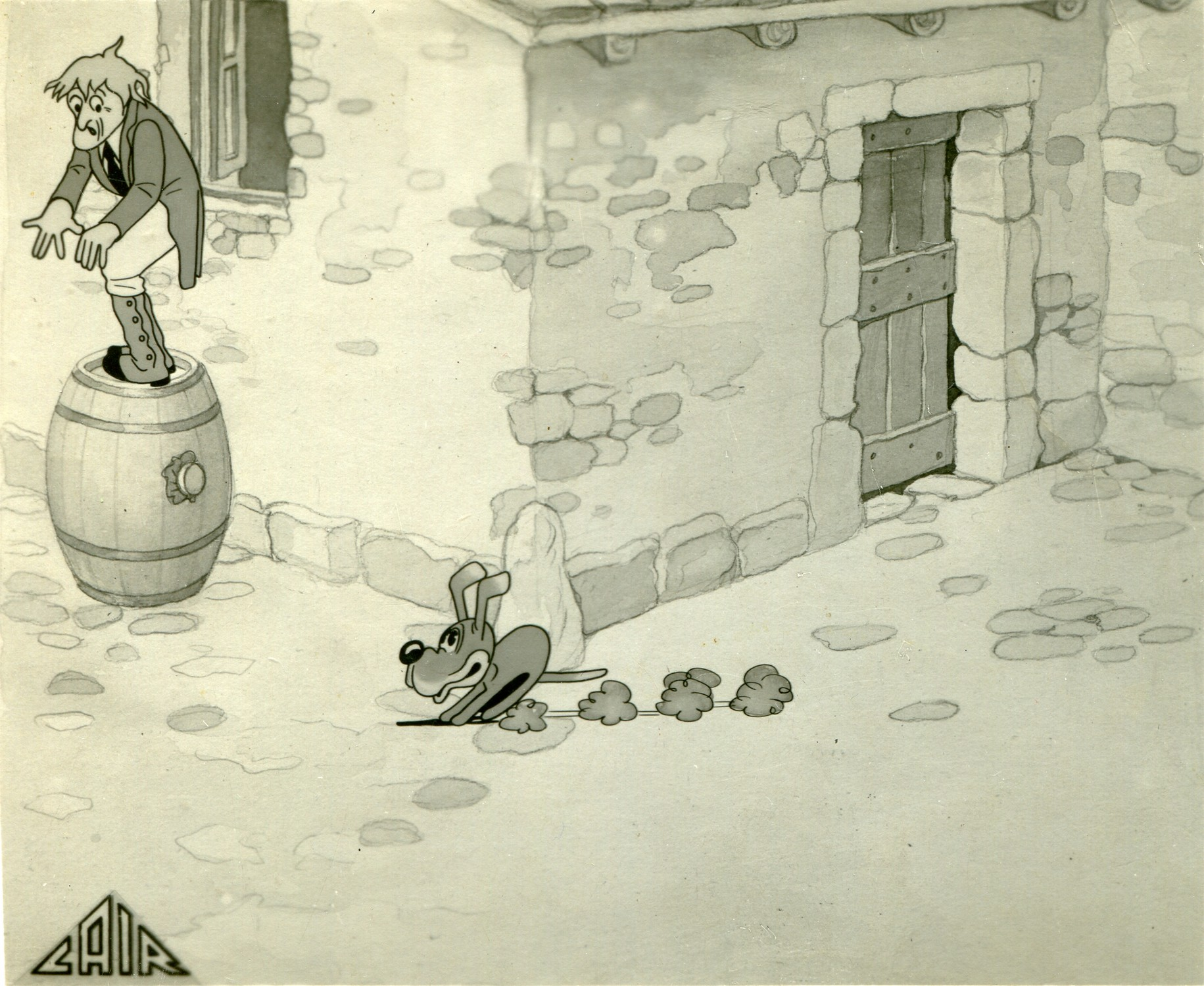 Scena tratta dal film d'animazione "Le Avventure di Pinocchio" - Italia, 1936